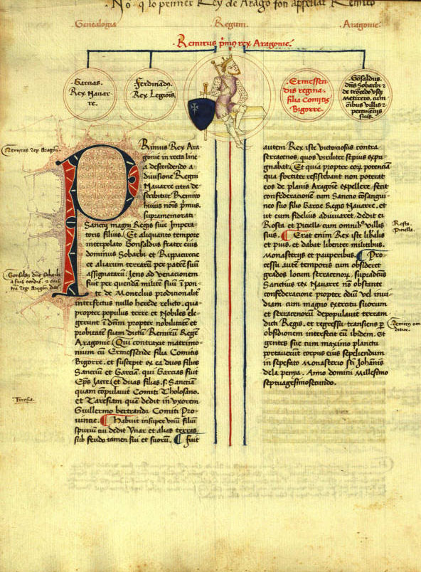 Genealogies dels comtes de Barcelona; continuades per l'arxiver Jaume Garcia i per Pere Miquel Carbonell. Manuscrit 246